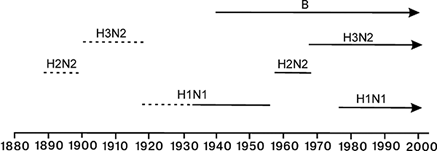 Циклы вируса гриппа